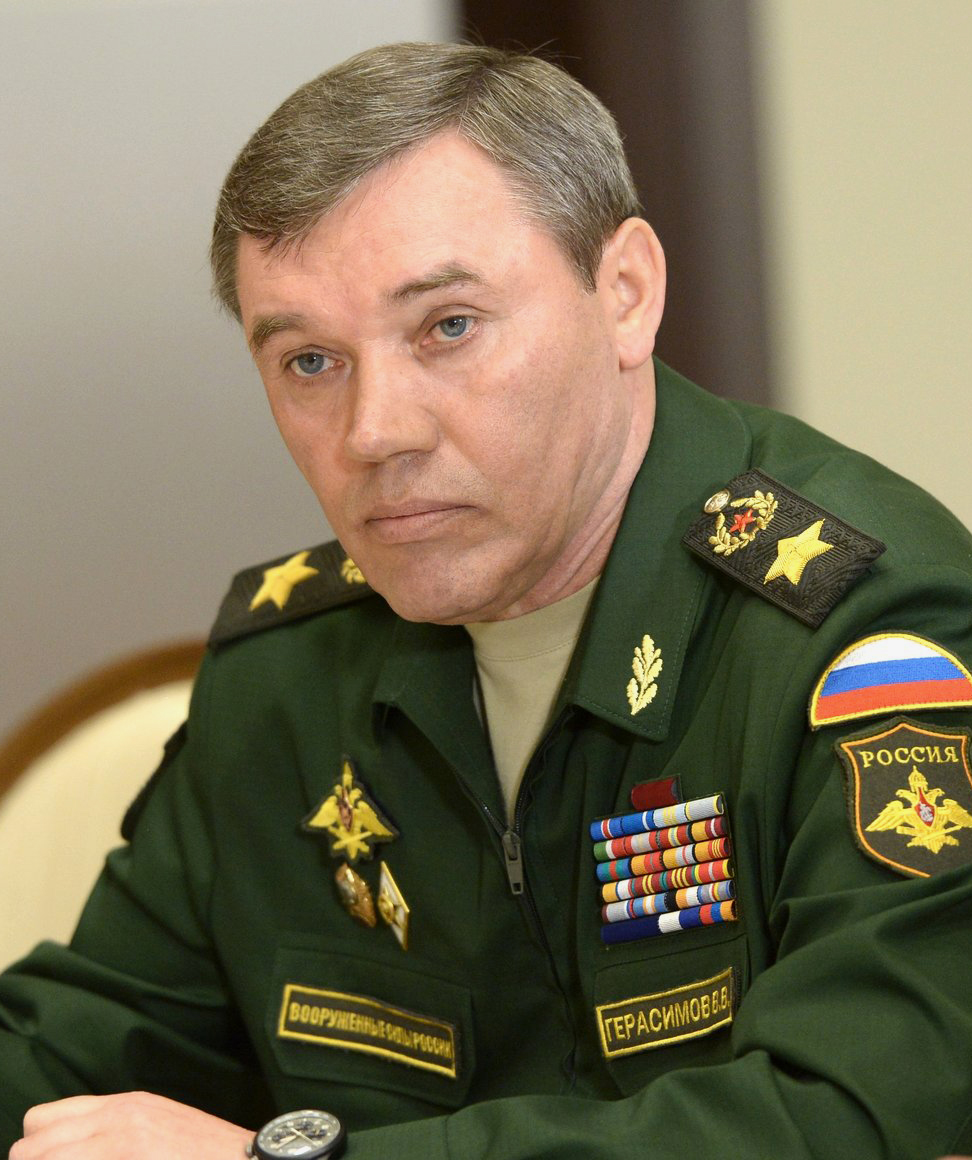 Начальник Генерального штаба Вооружённых Сил Валерий Герасимов перед началом совещания с руководством Министерства обороны и представителями военно-промышленного комплекса